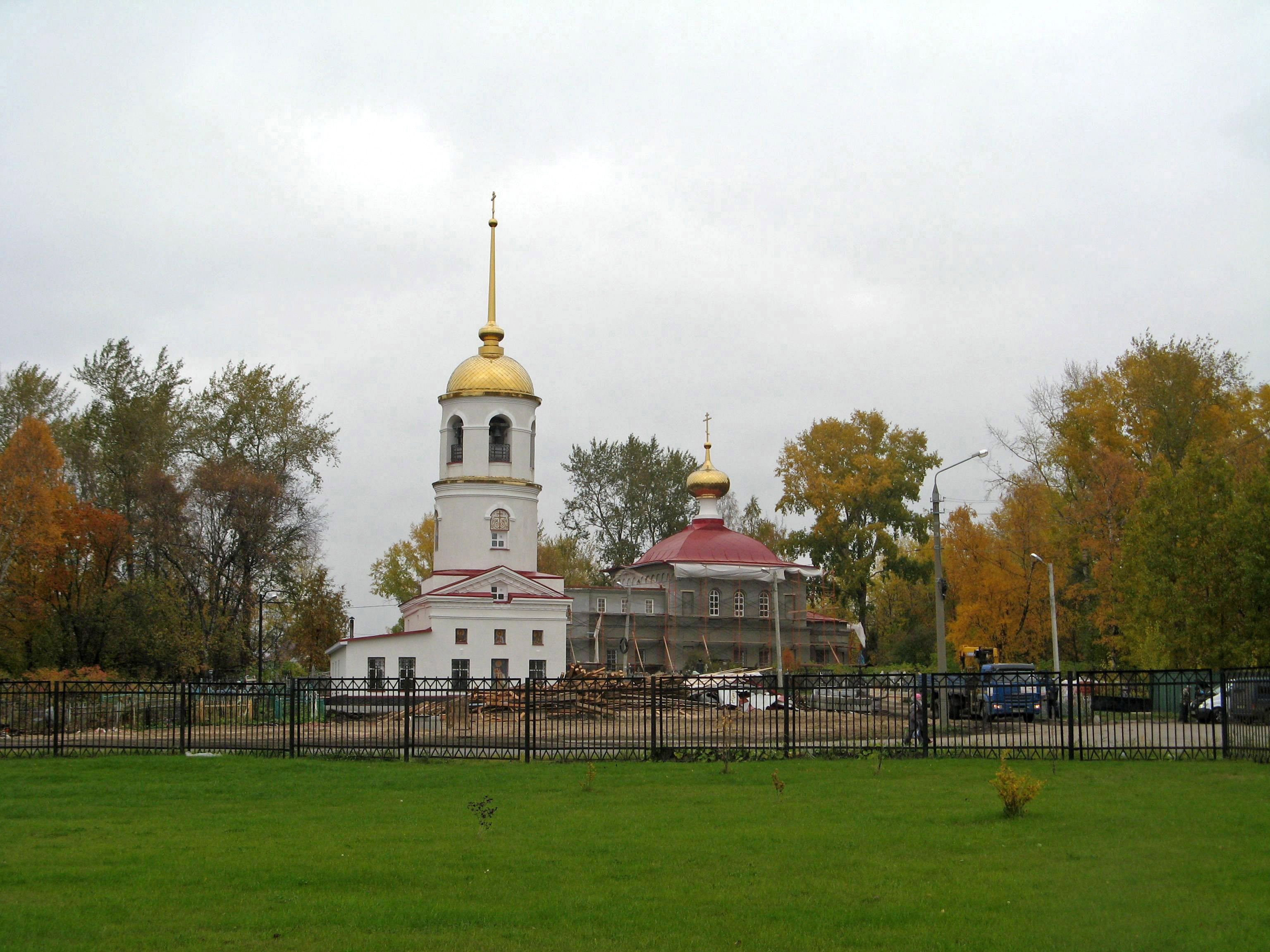 Комплекс культовый: улица Металлистов, городское кладбище, Архангельск, Архангельская область